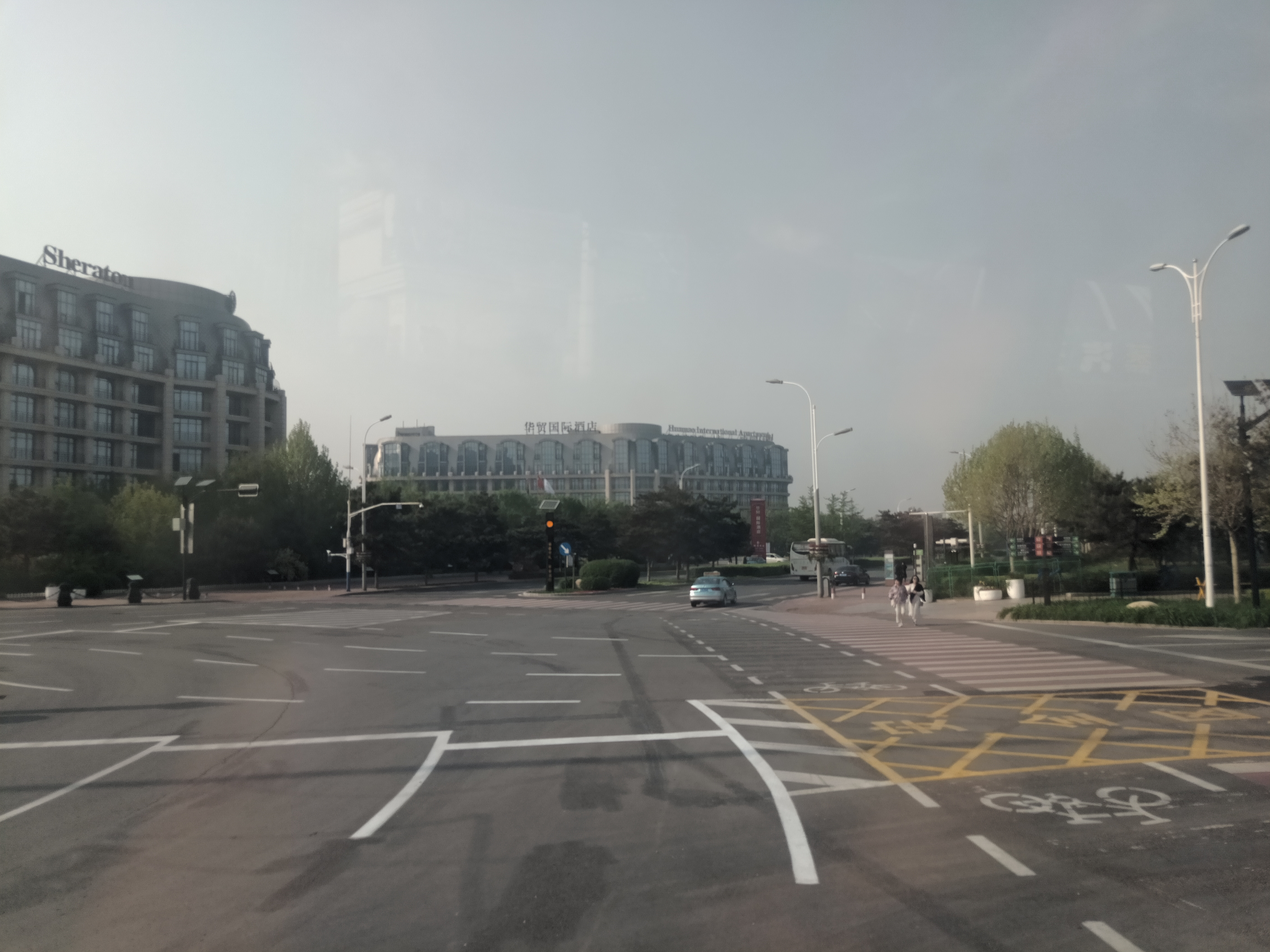 粵語: 喺海濱路望去華貿國際酒店嗰邊